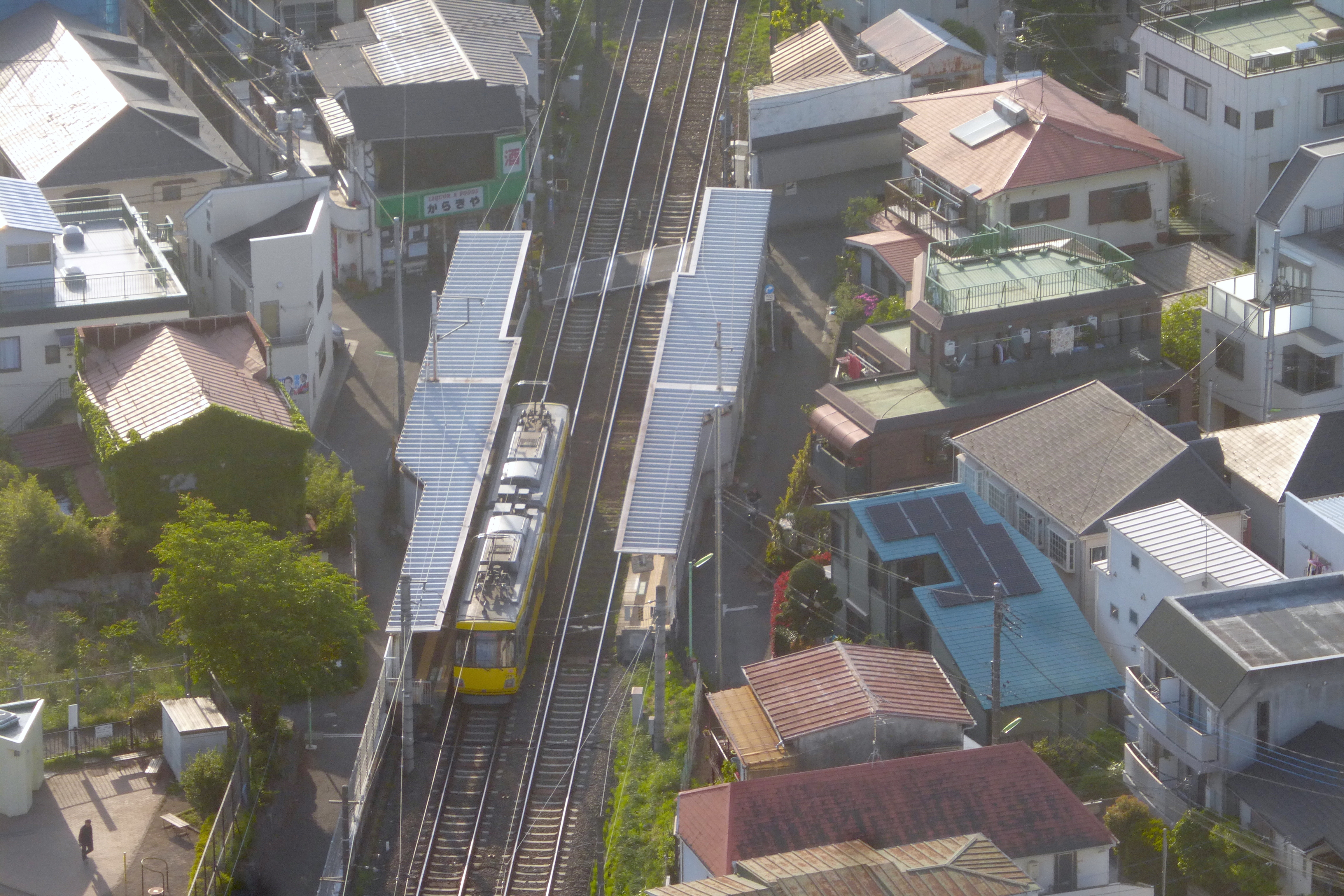 Nishi-Taishidō Station (西太子堂駅)